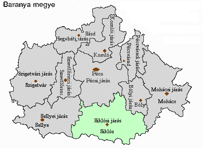 Magyarország, Baranya megye, Siklósi járás